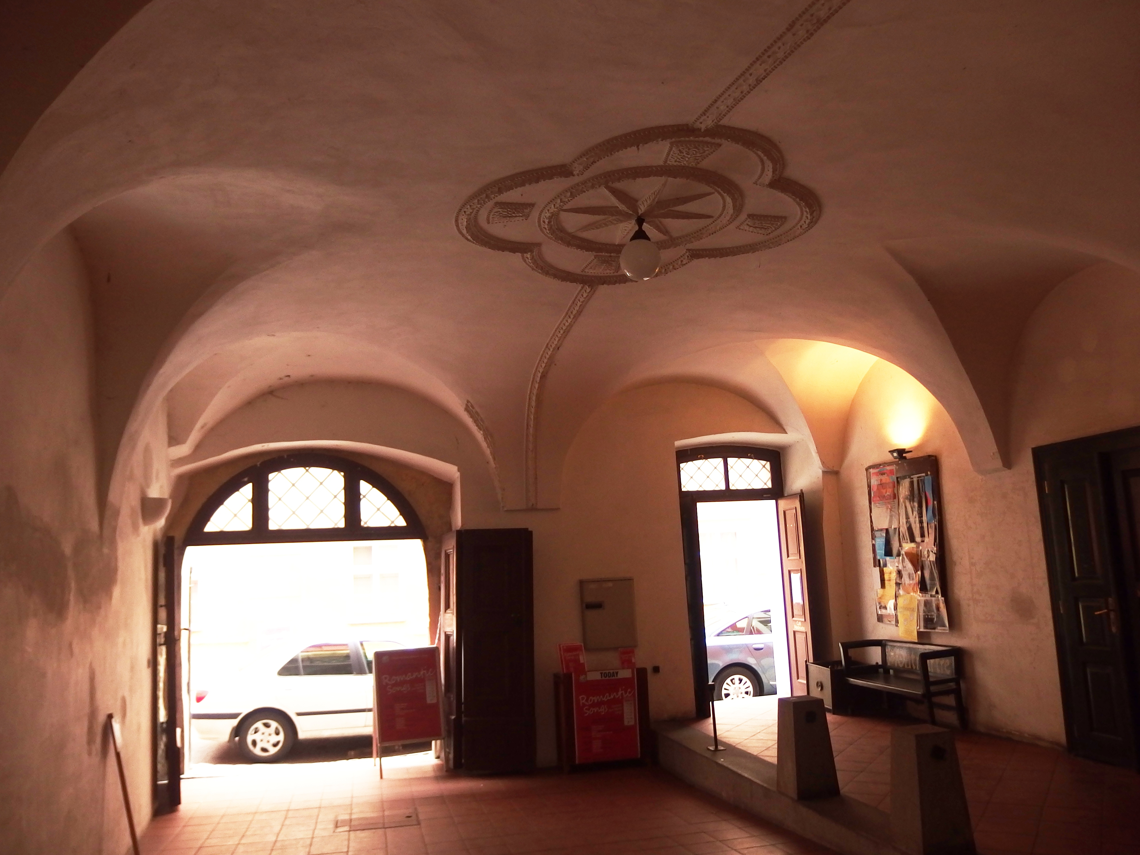 U tří divých mužů, Řetězová 224/7, Staré Město (Praha).